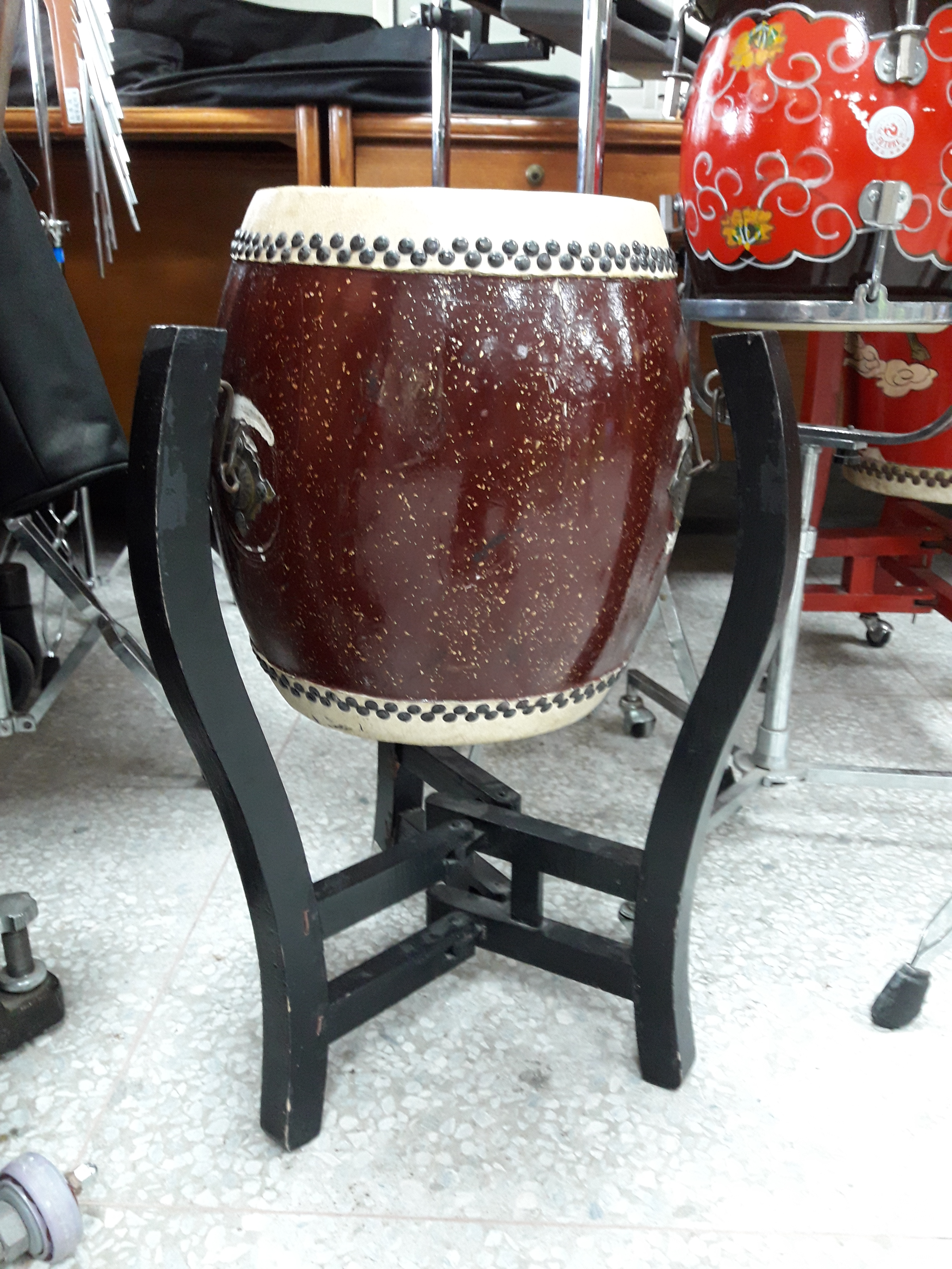 中國傳統打擊樂器小堂鼓。